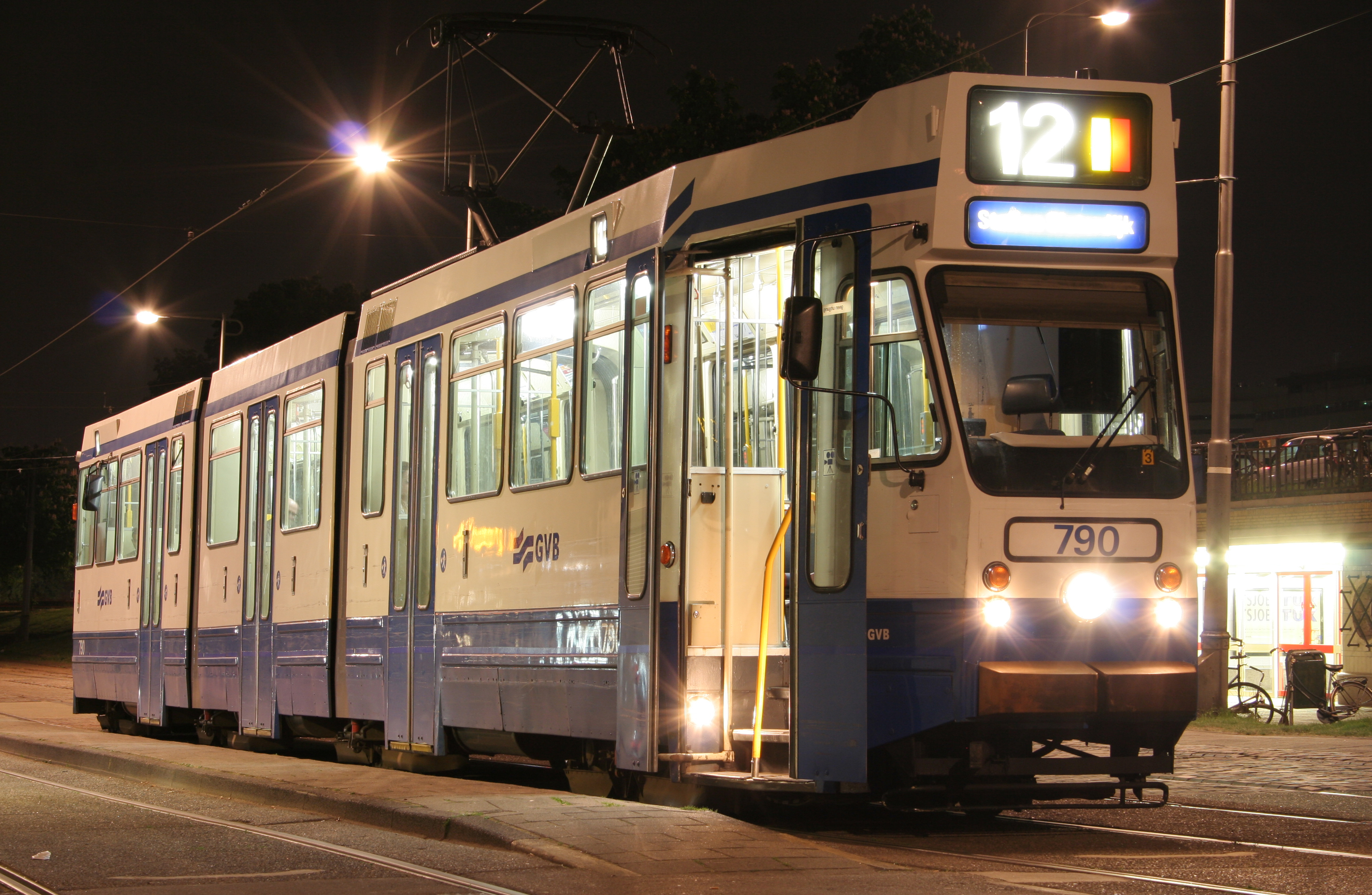 GVB 790 's avonds bij station Amsterdam Amstel.